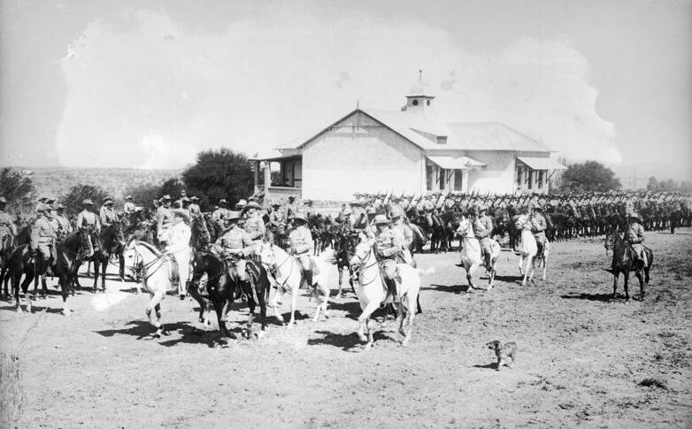 Parade der Schutztruppe